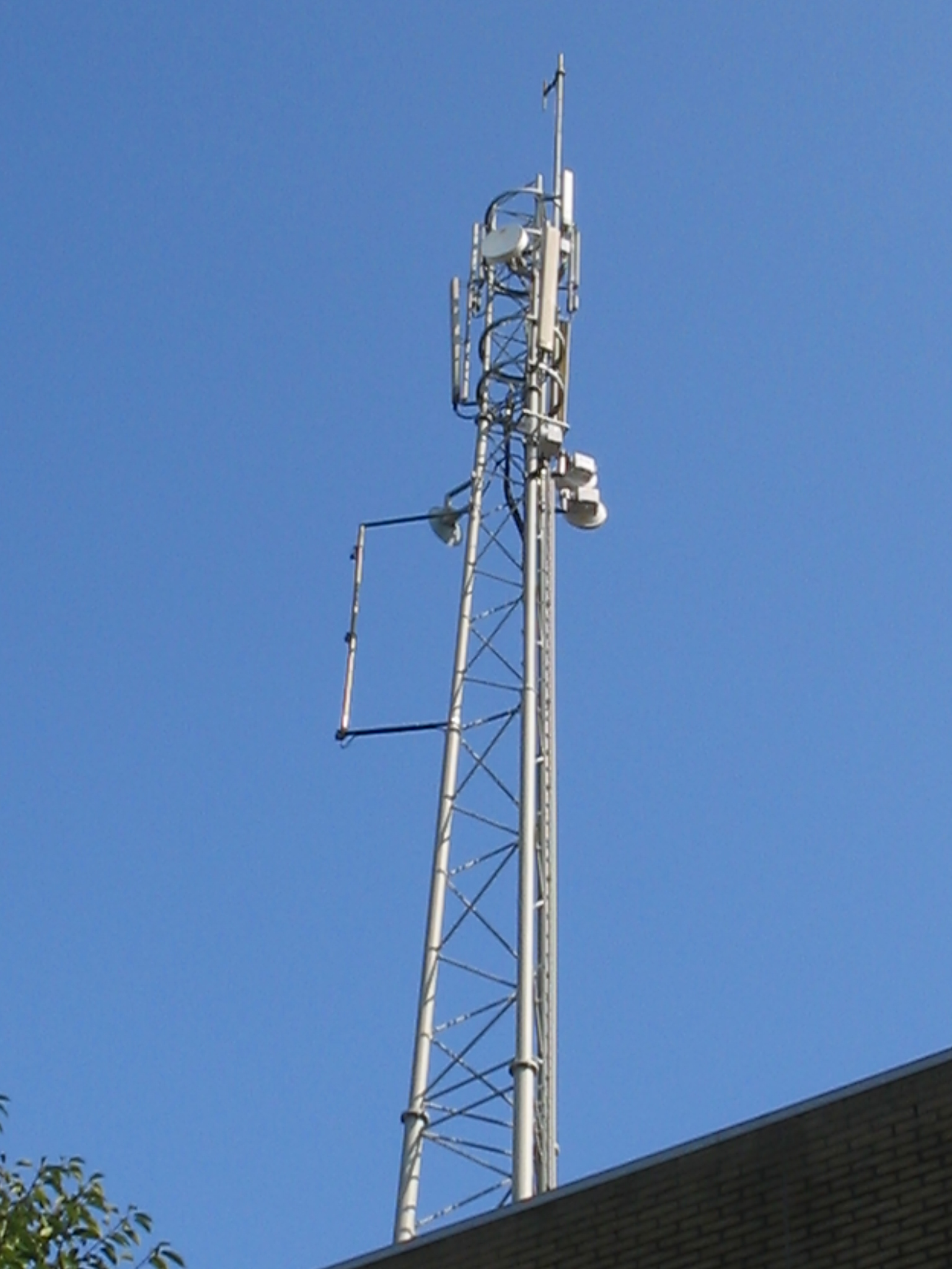 GSM mast in Delft